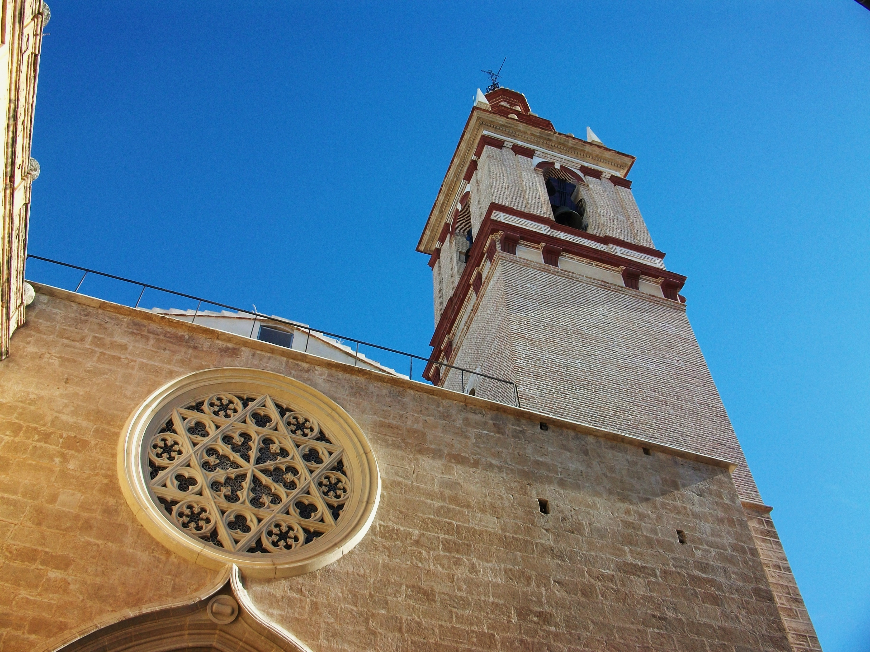 Església de sant Nicolau de València, rosassa i campanar.